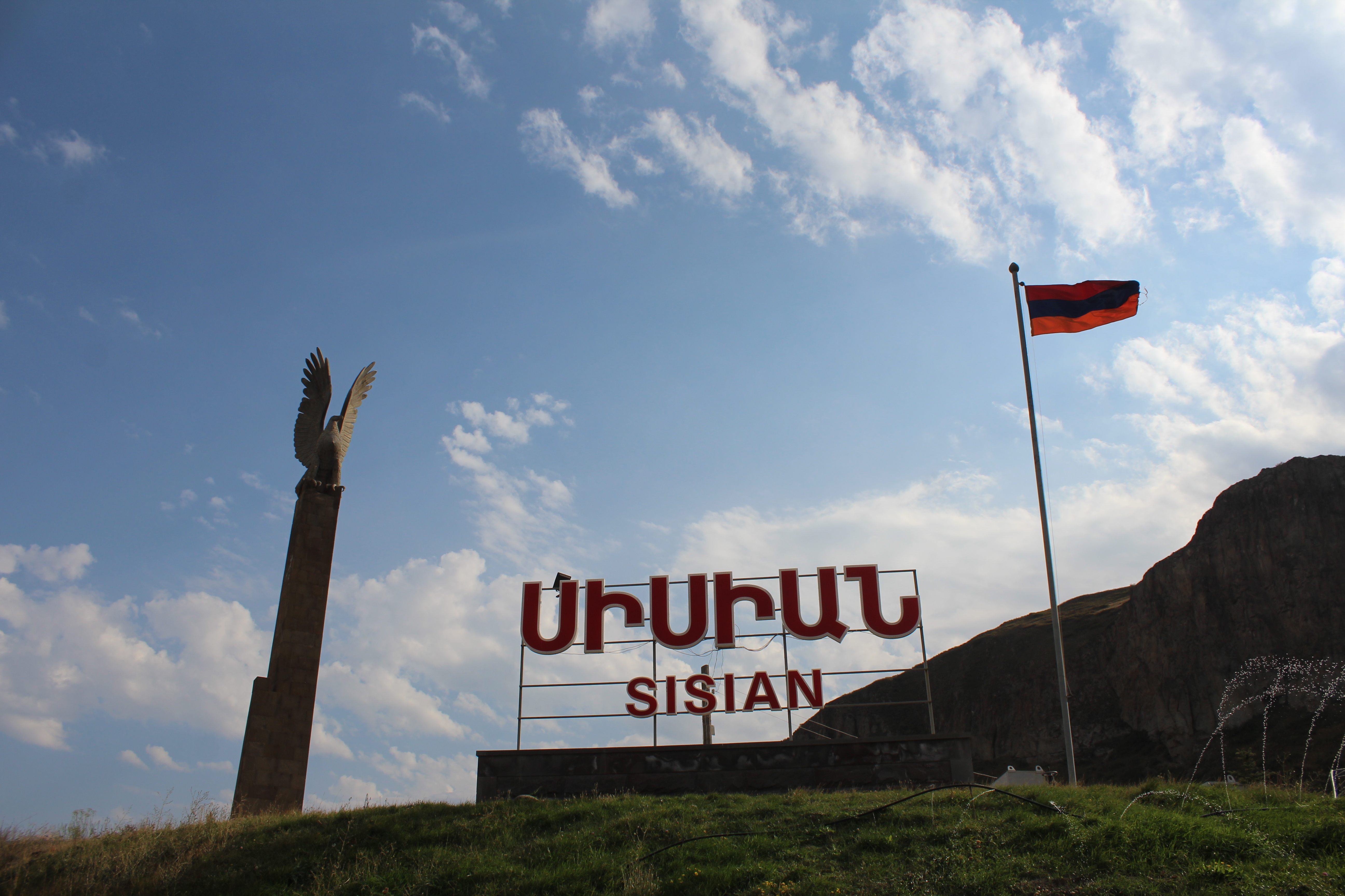 Արծիվ հուշարձանը գտնվում է Սիսիան քաղաքի մուտքի մոտ։ 6/20